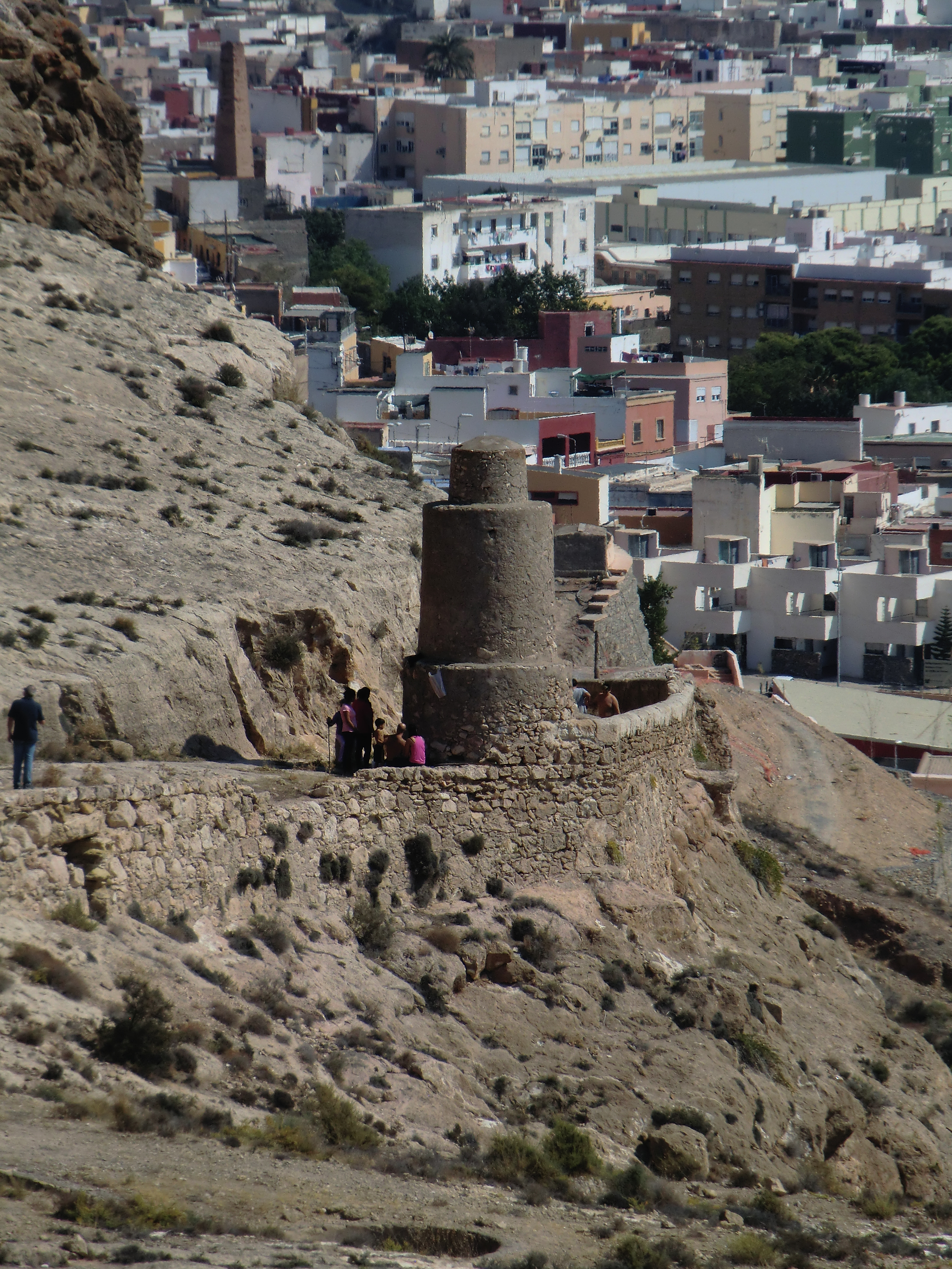 Vista de Almería desde las baterías antiaéreas